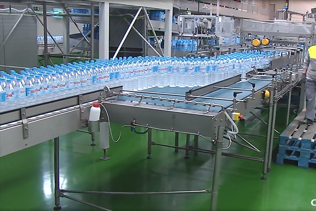 Juan Vicente Herrera inaugura la nueva planta de envasado de Bezoya en Ortigosa del Monte (provincia de Segovia).